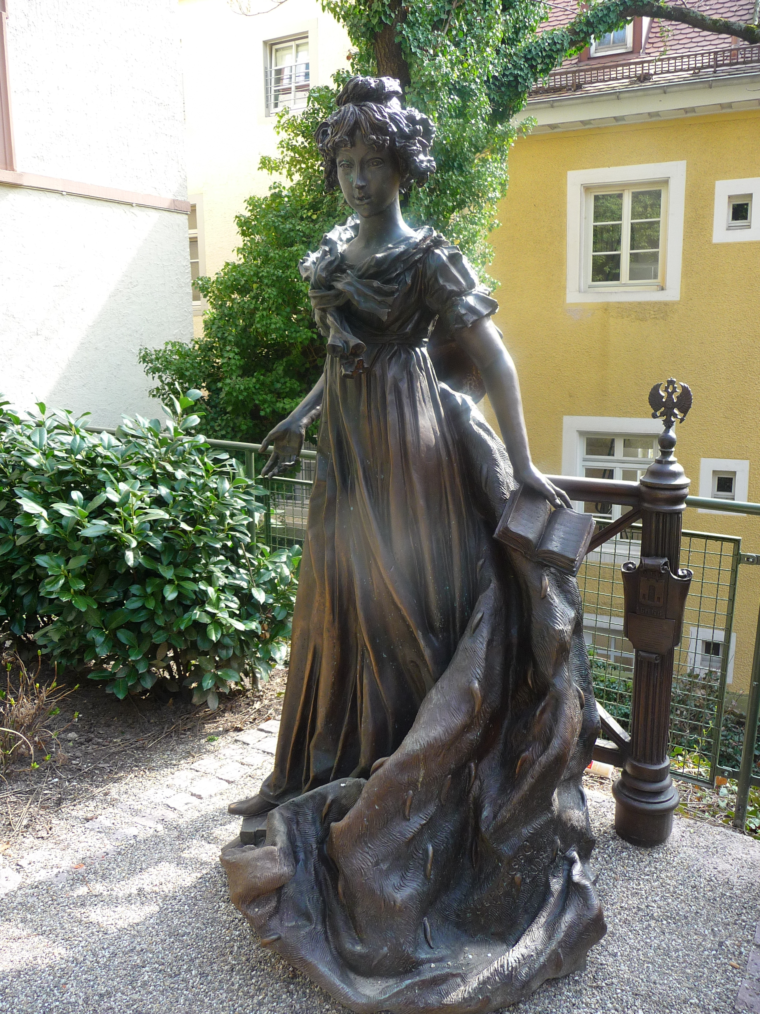 Statue von Zarin Jelisaveta Alexeevna, Prinzessin Marie Luise Auguste von Baden, Gemahlin von Zar Alexander I. von Russland, aufgestellt in Baden-Baden (Baden-Württemberg, Deutschland), Geschenk der "Bank Am Roten Tor AG" Moskau an die Stadt Baden-Baden am 27.05.2008 auf Initiative der Turgenev Gesellschaft Deutschland